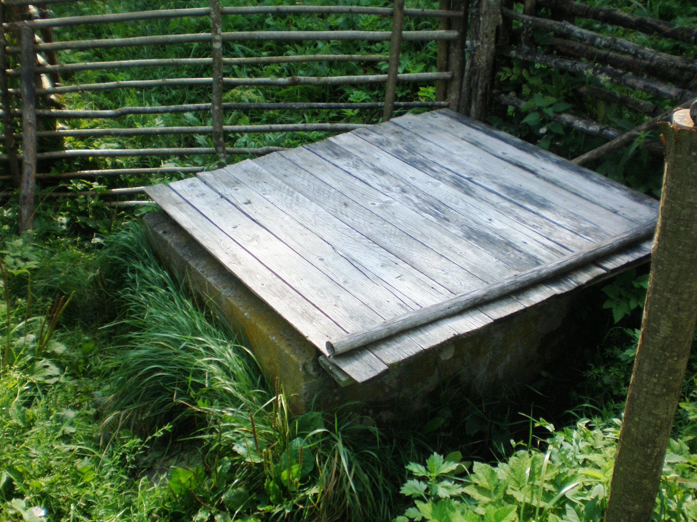 Senovinis kvadratinis šulinys, Barsukynė, Kėdainių raj.